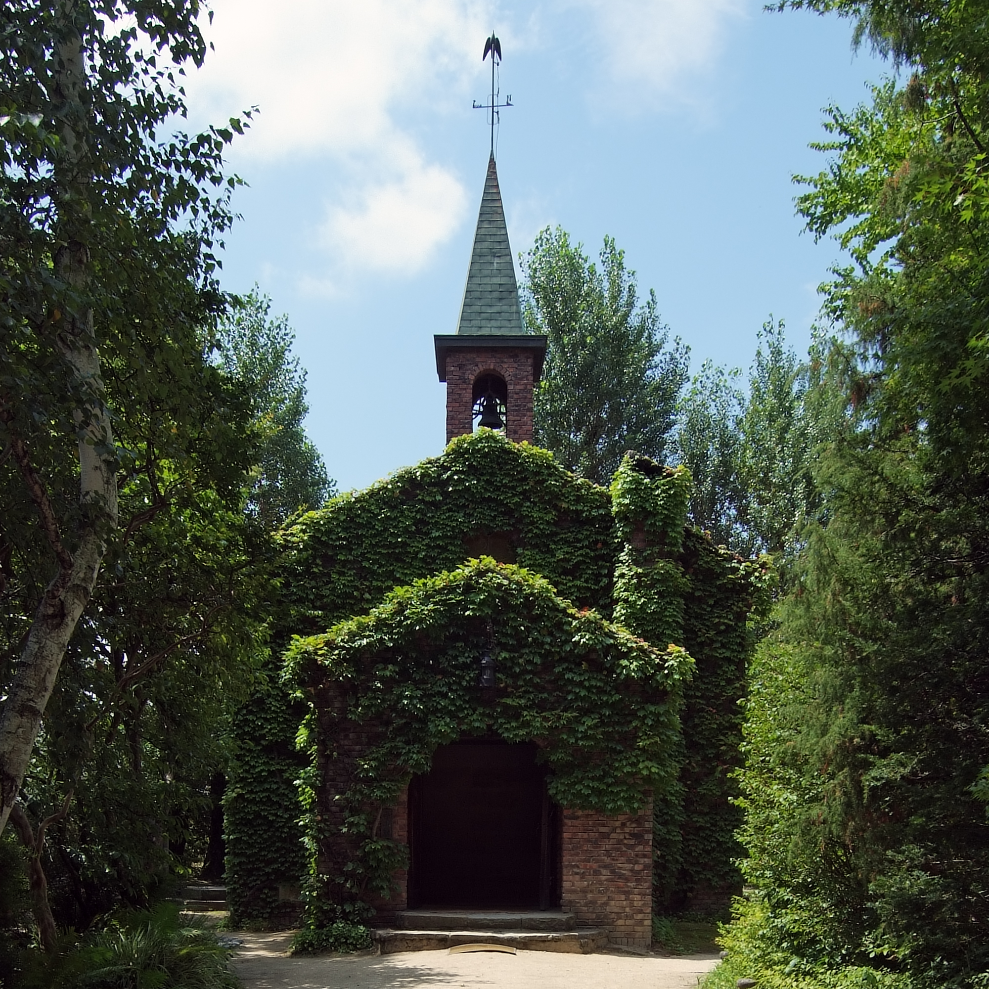 Rokuzan Art Museum in Azumino, Nagano, Japan